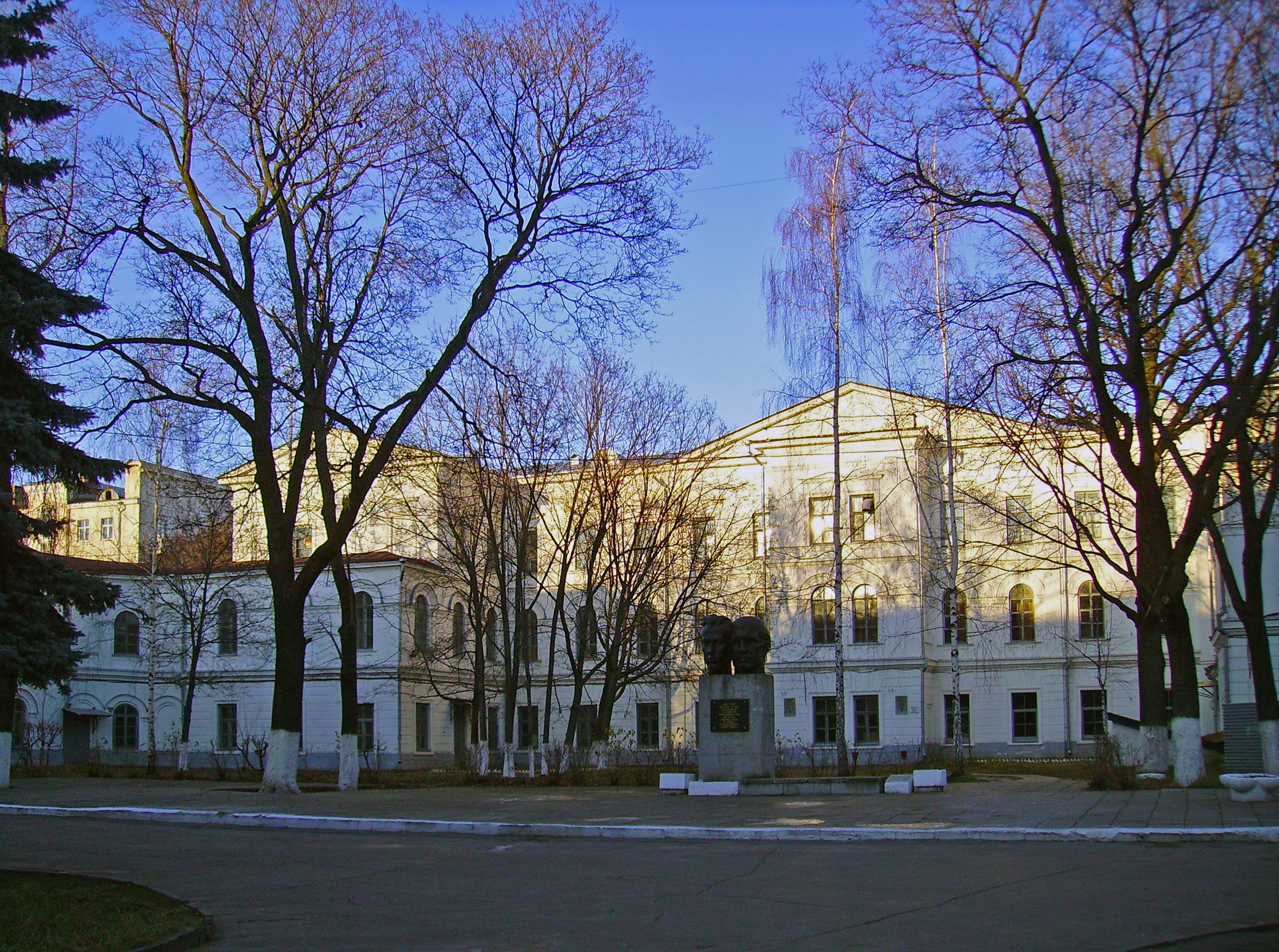 Нижний Новгород. Третий корпус Технического университета